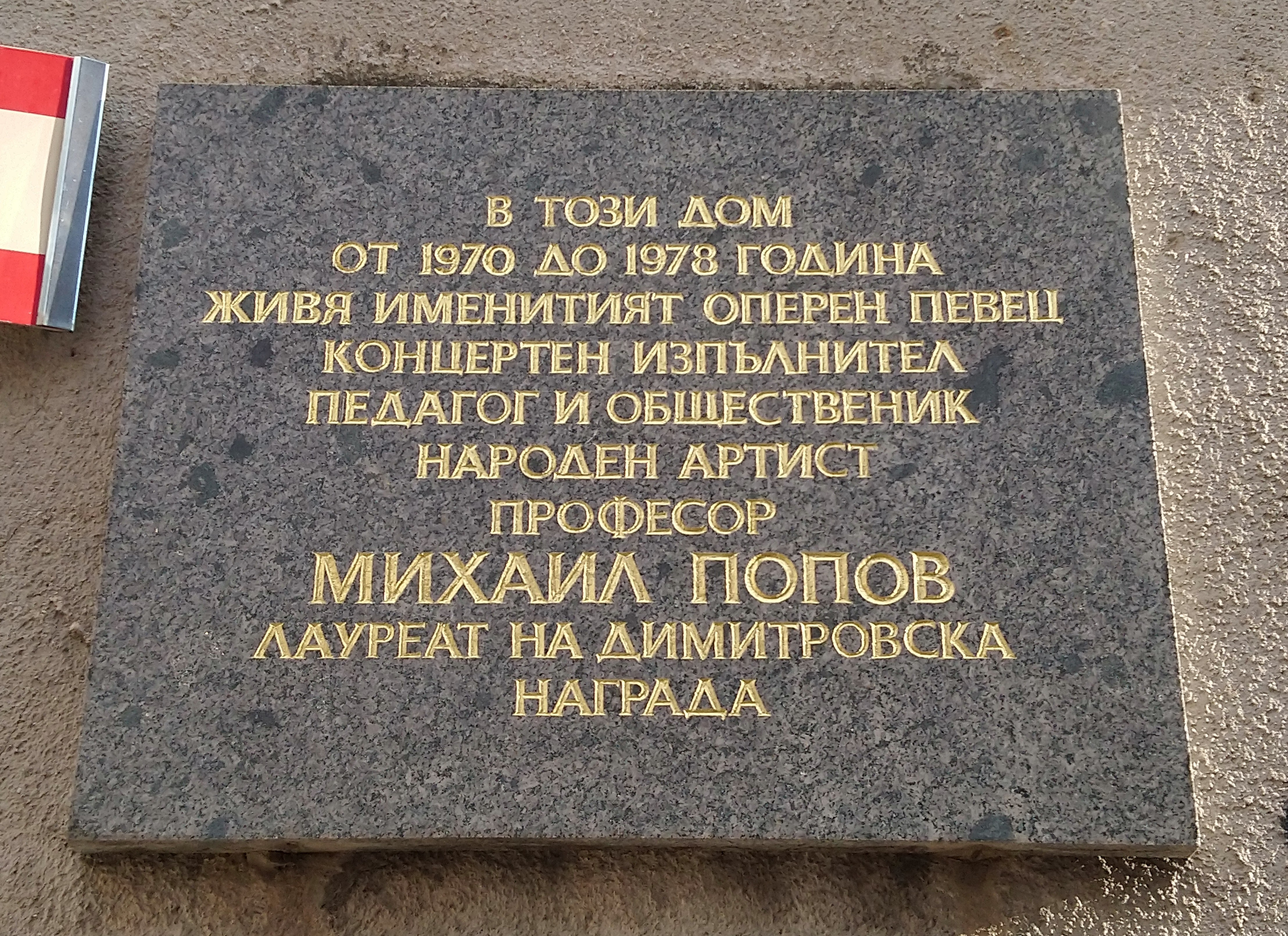 Паметна плоча на оперния певец Михаил Попов, ул. Струмица 1, София